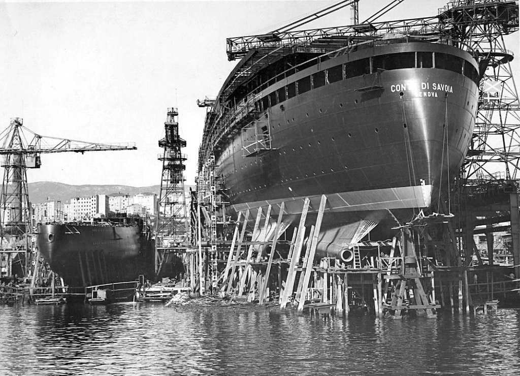 Il varo del Cadorna a Trieste con il Conte di Savoia prossimo al varo